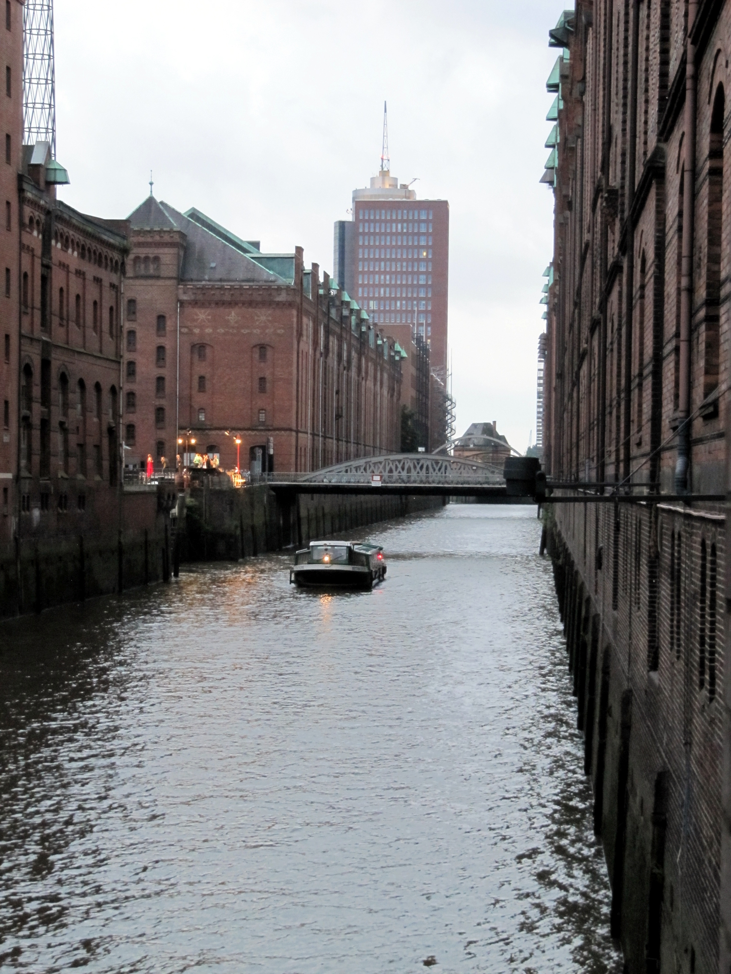 Kesselhaus Speicherstadt (Infocenter HafenCity bzw. Theater in der Speicherstadt) und Brooksfleet.